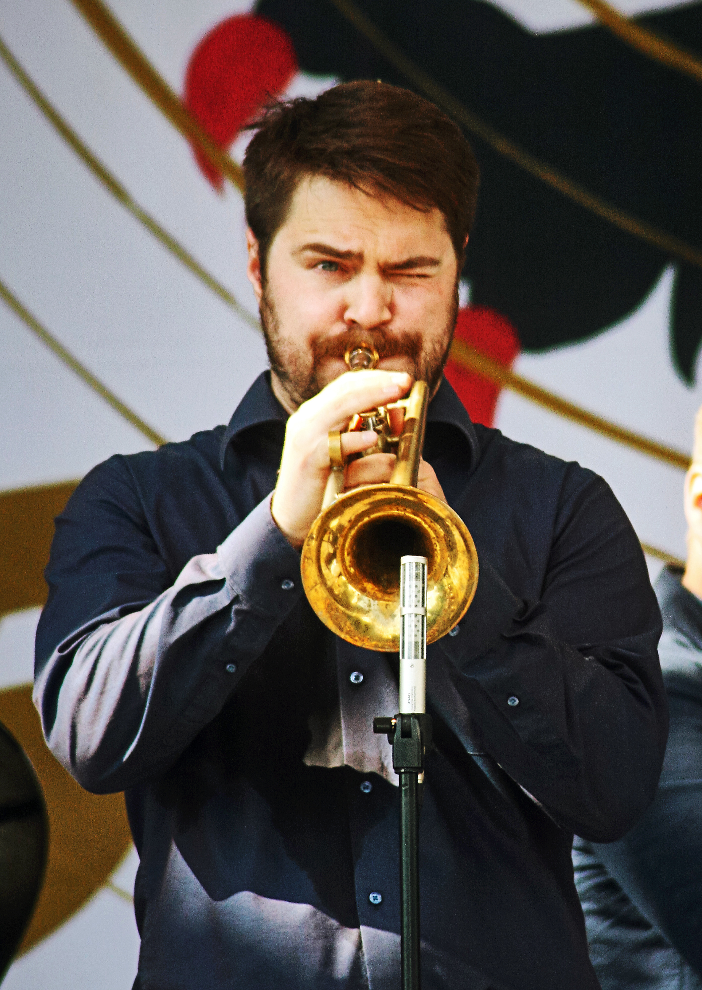 Verneri Pohjola Quartet livenä Lokkilavalla Pori Jazzeilla 2015